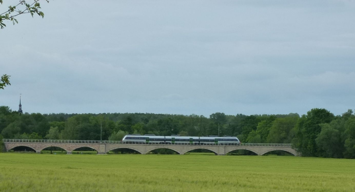 Wyhrataltalviadukt und Zedtlitzer Kirchturm